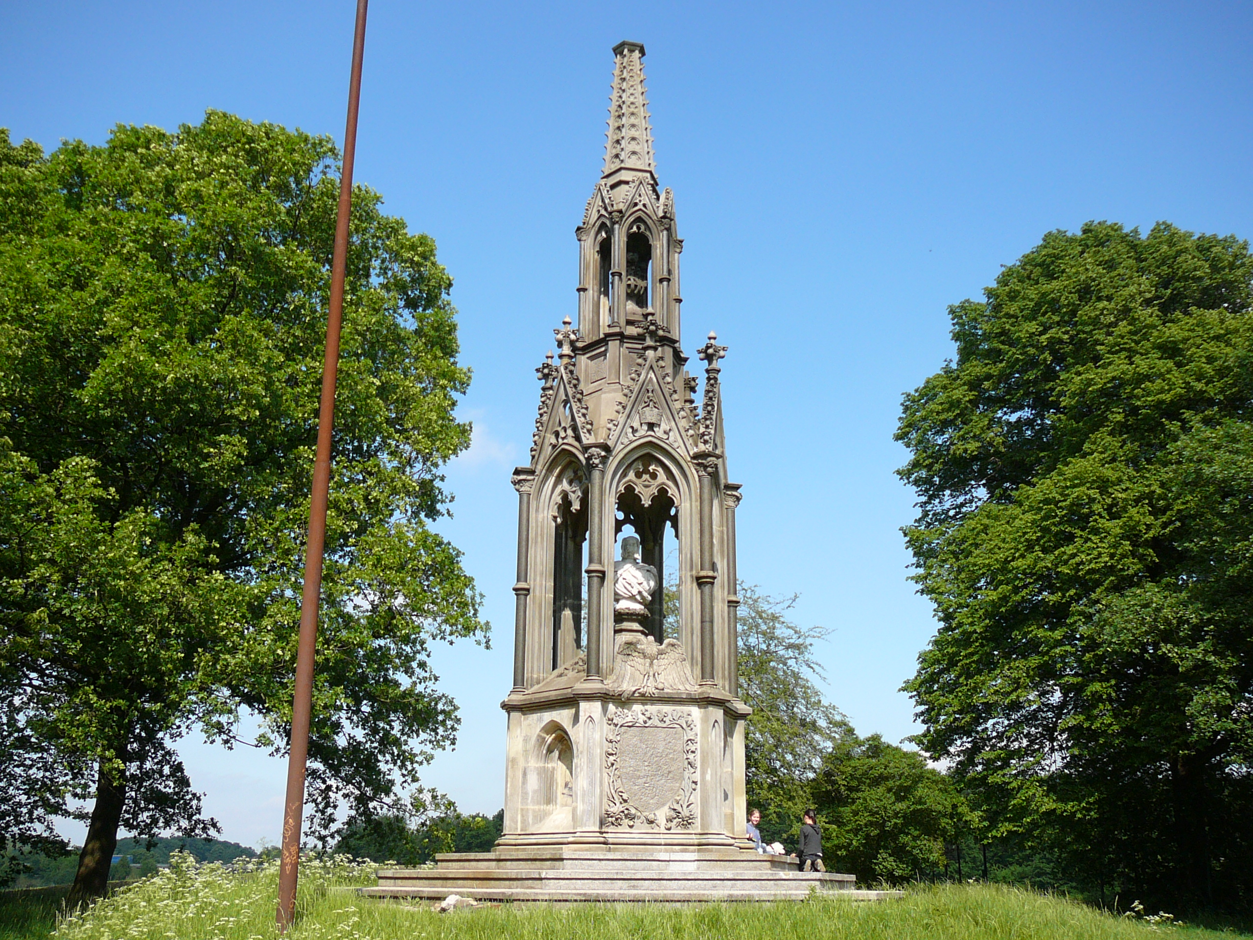 Kaiser Wilhelm-Denkmal (Wilhelm I.) in Wülfrath an der Grenze zu Wuppertal, Nähe Aprather Schloss